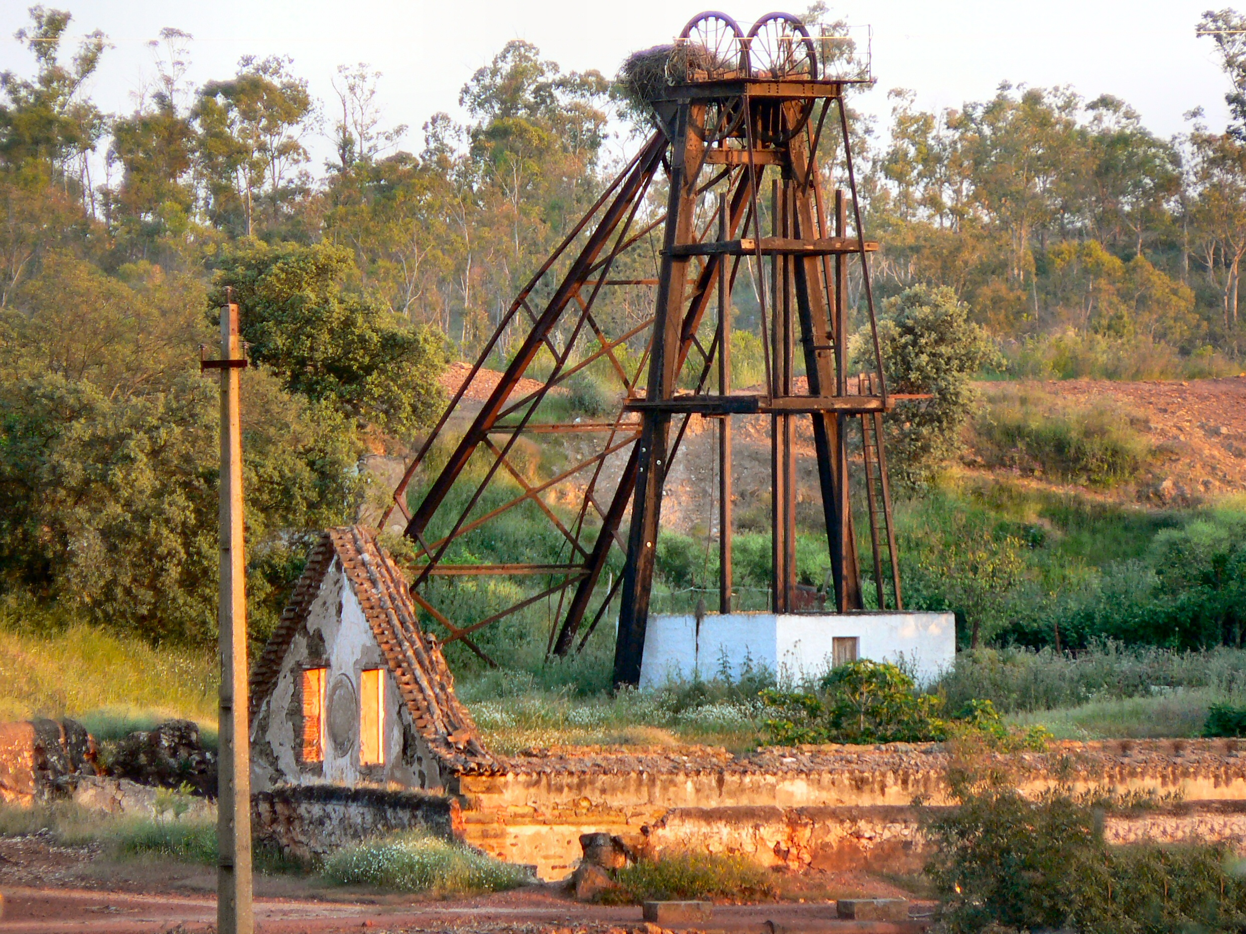 Instalações abandonadas das Minas de São Domingos